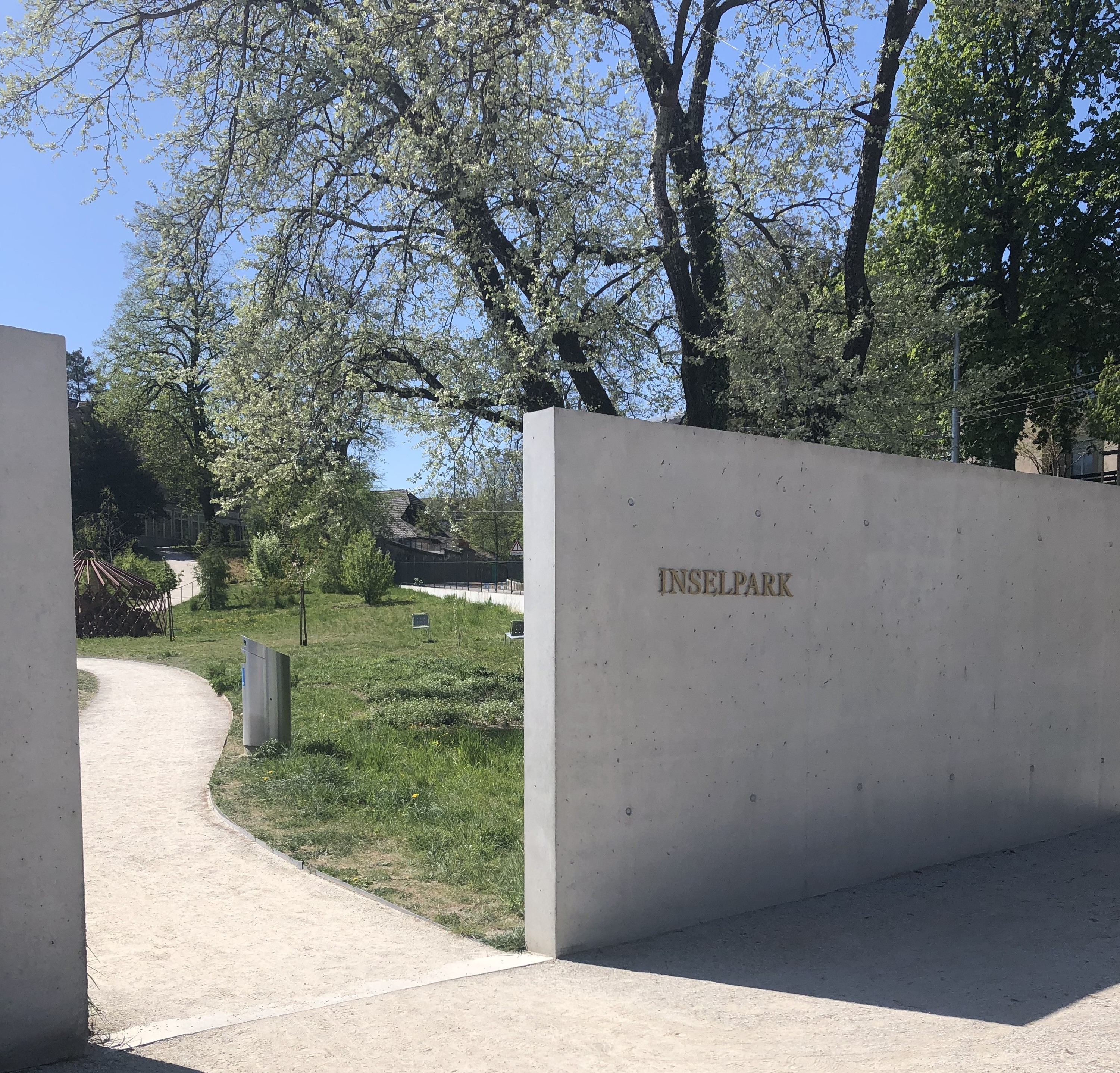 Inselspital Eingang Inselpark